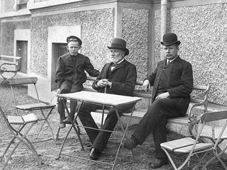 Antenor Nydqvist (1817 - 1914) med sonen Herman (1862 - ?) och barnbarnet Antenor (1893 - ?).